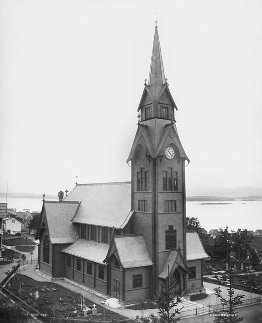 Molde bys tredje kirke, tegnet av Henrik Nissen og vigslet i 1887. Brant i 1940. Foto: Knud Knudsen, fra billedbasen Marcus.